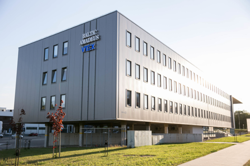 Baltic Amadeus būstinė